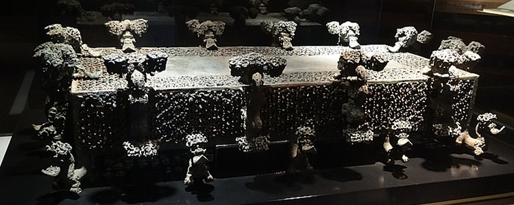 云纹铜禁，春秋时期，河南省淅川县下寺楚国墓地M2出土，现藏于河南博物院